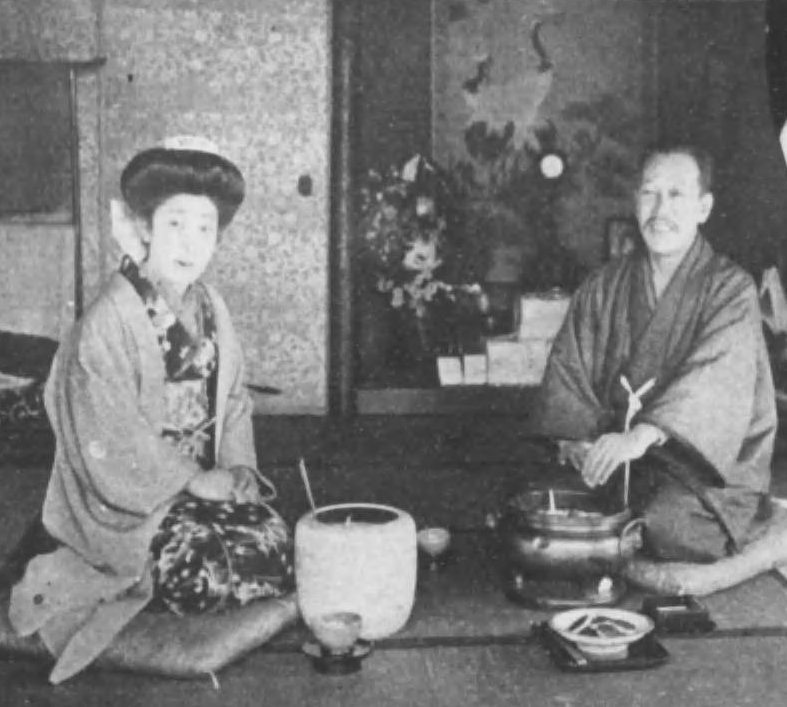 森律子と森肇